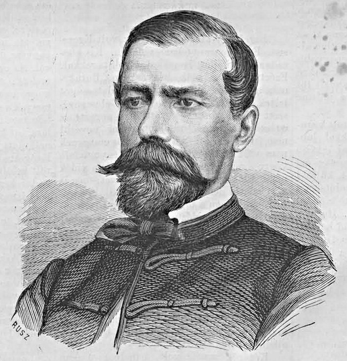 Rajner Pál (1823–1879) politikus, miniszter, az 1848–49-es szabadságharcban Ivánka Imre, majd Guyon Richárd hadsegéde. Rusz Károly metszete (Vasárnapi Ujság, 1869. október 31.)